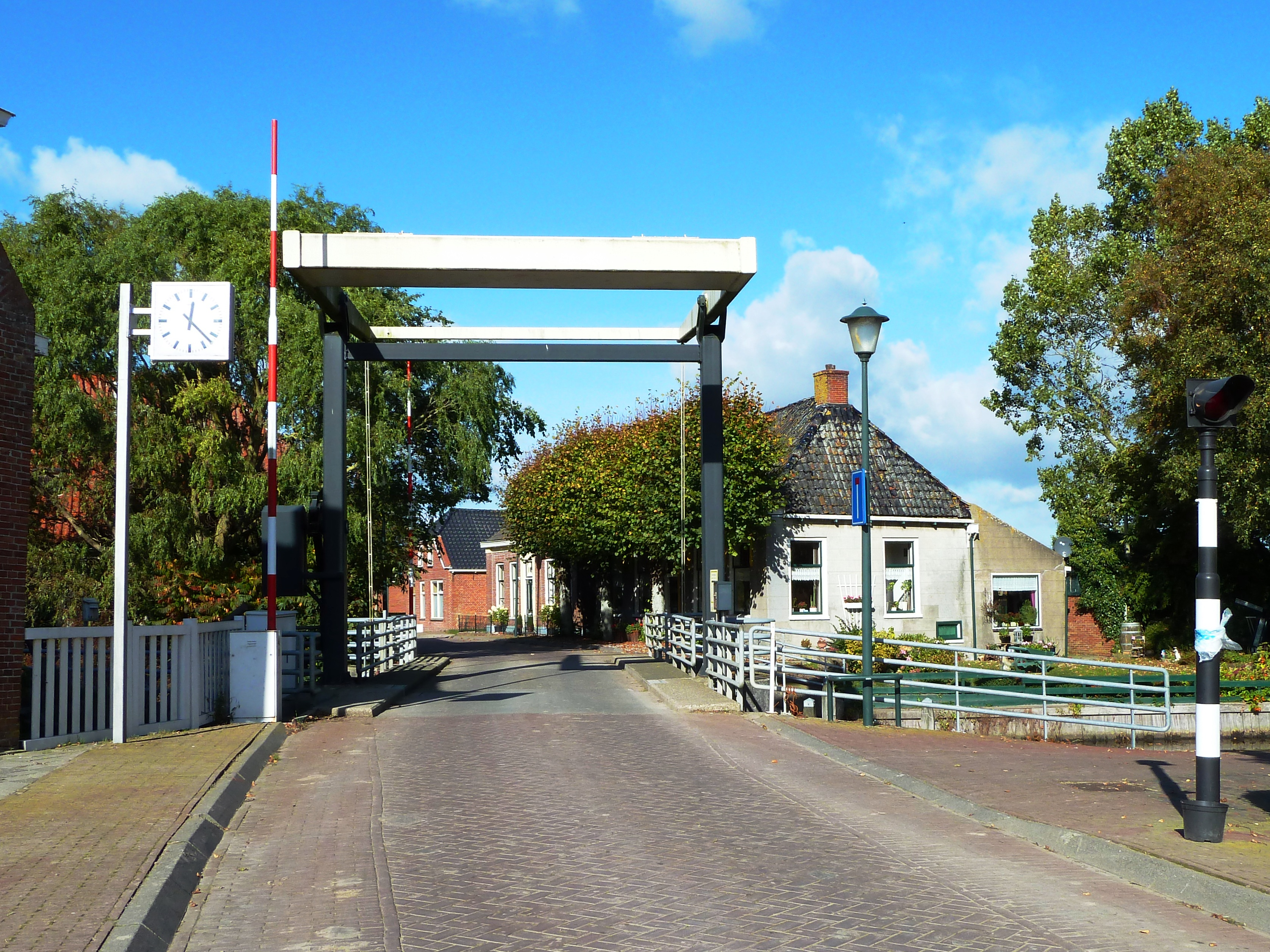 Brug over het Zijldiep (gekanaliseerde Lauwers) in Pieterzijl.